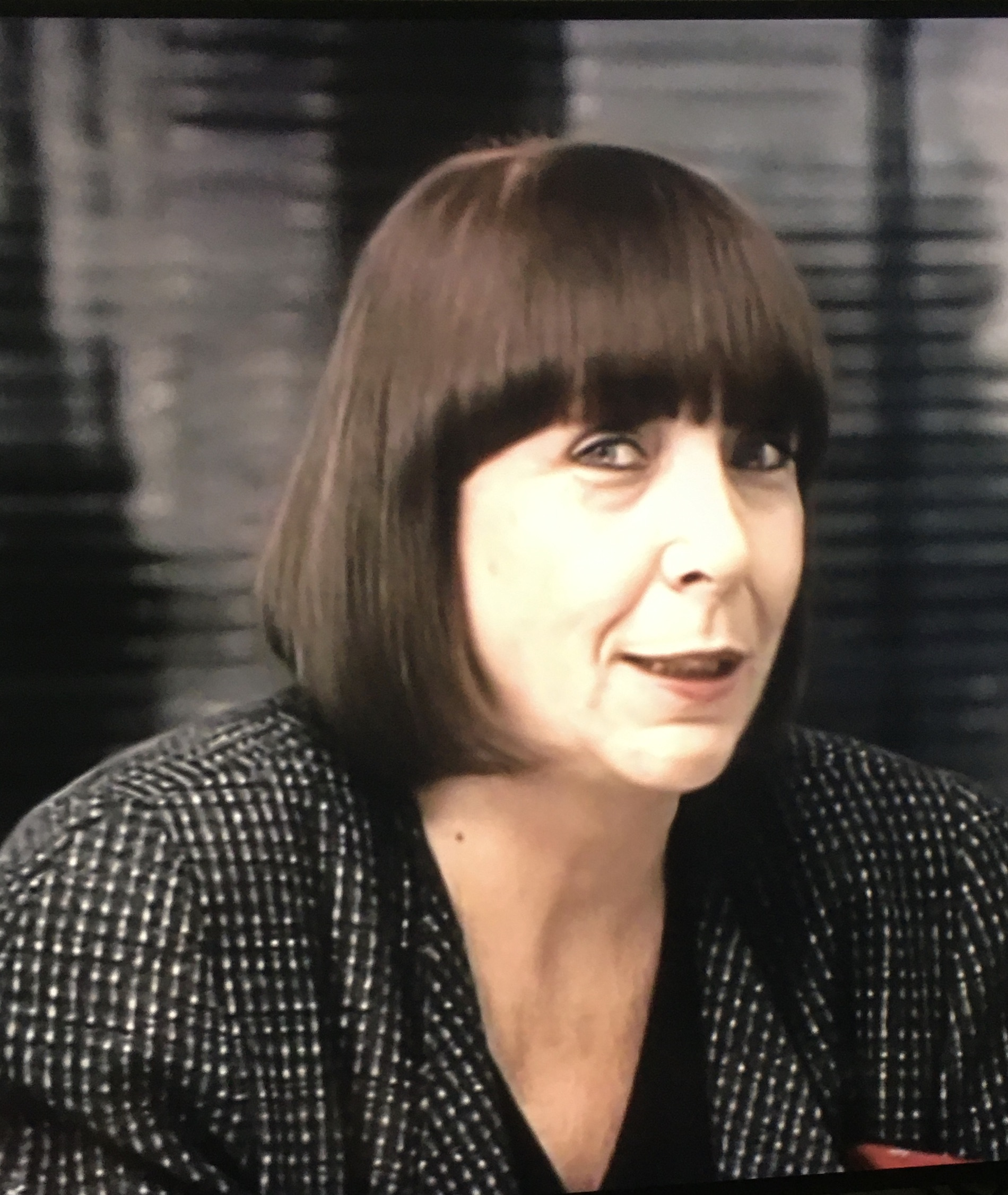 Krizia, Mariuccia Mandelli nel 1989